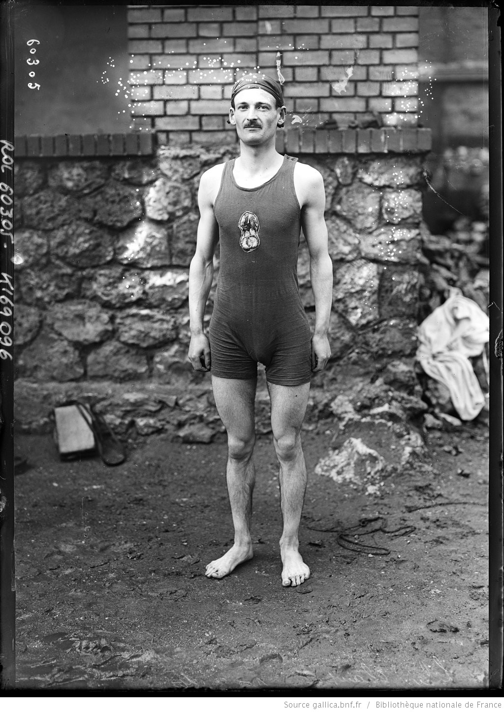 [1-8-20, championnat de France de natation, bassin de la maison Niclausse à la Villette], Lehu, champion 100 m dos : [photographie de presse] / [Agence Rol]